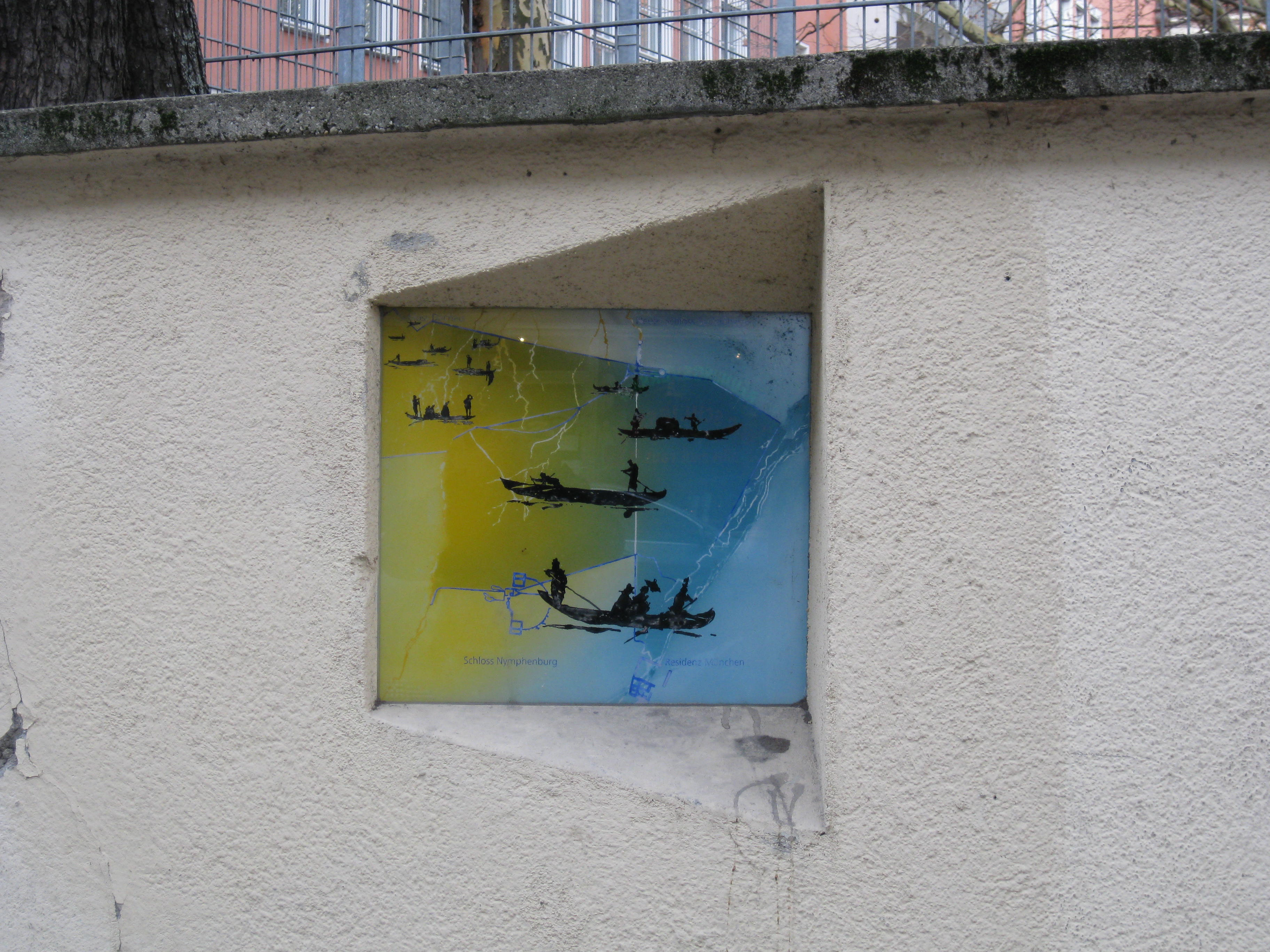 Erinnerungsschild an den Türkengraben in München. Schellingstrasse an der Kreuzung zur Türkenstrasse.